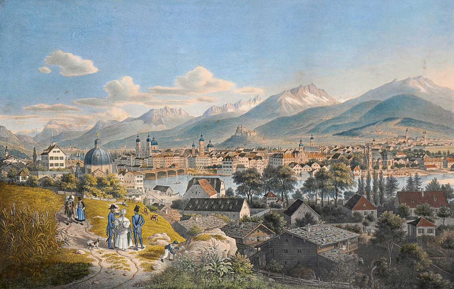 Innsbruck, kolorierte Lithographie bei C. Hochwind, München; 37,5 x 49 cm